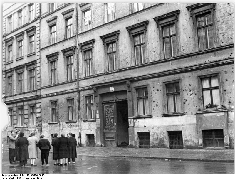 Berlin, Marienstraße, Wohnhaus, Altbau Zentralbild Martin 29.12.1959 Marienstrasse 7, Berlin, ist eine sozialistische Hausgemeinschaft Niemand ist sich in der Hausgemeinschaft der Marienstrasse 7, Berlin, selbst überlassen. Alle Bewohner helfen sich gegenseitig, schwierige Arbeiten zu bewältigen und verbringen gemeinsam schöne Stunden in ihrem selbst eingerichteten Kulturraum. Die Bewohner wollen als sozialistische Gemeinschaft leben. Aus Mitteln, die sich die Bewohner durch gemeinsame Arbeiten erwerben, schafften sie sich einen Fernsehapparat, eine Waschmaschine, einen Staubsauger, eine Nähmaschine, die gesamte Einrichtung für ihren Klubraum an. Jetzt ist die Gemeinschaft dabei, sich eine komfortable Bar für gesellige Abende einzurichten. UBz: Durch gemeinsame Arbeit haben sich die Bewohner dieser alten Berliner Mietskaserne in der Marienstrasse ein kulturvolleres Leben geschaffen. In Kürze wollen die Mitglieder der Hausgemeinschaft die Fassade verputzen lassen.